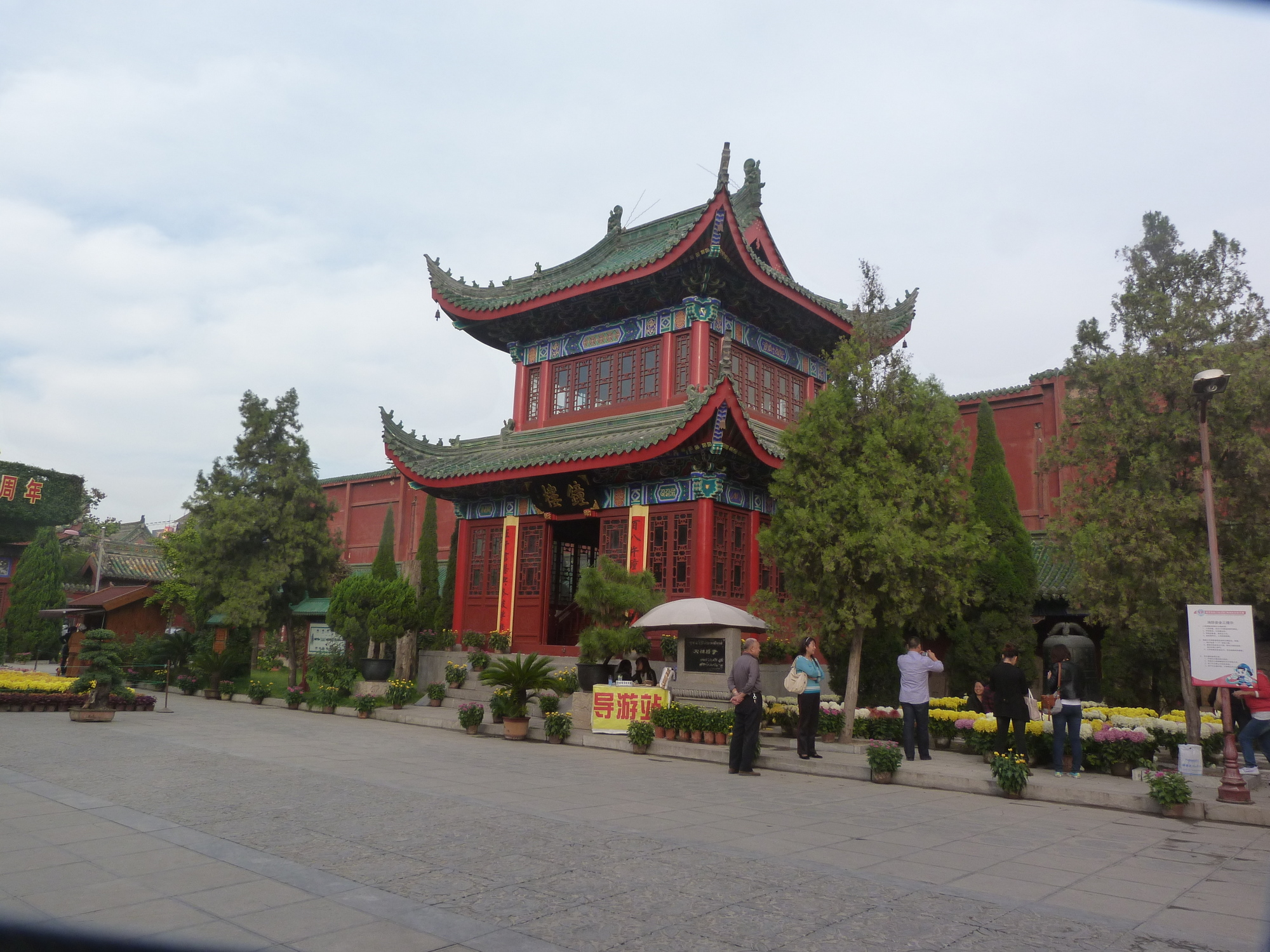 大相国寺钟楼